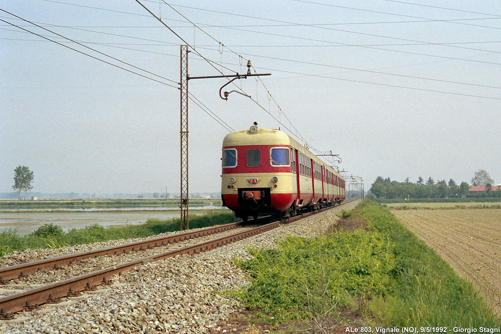 Il treno locale Arona-Novara, composto da un’elettromotrice ALe 803 e rimorchiate, in arrivo a Vignale.